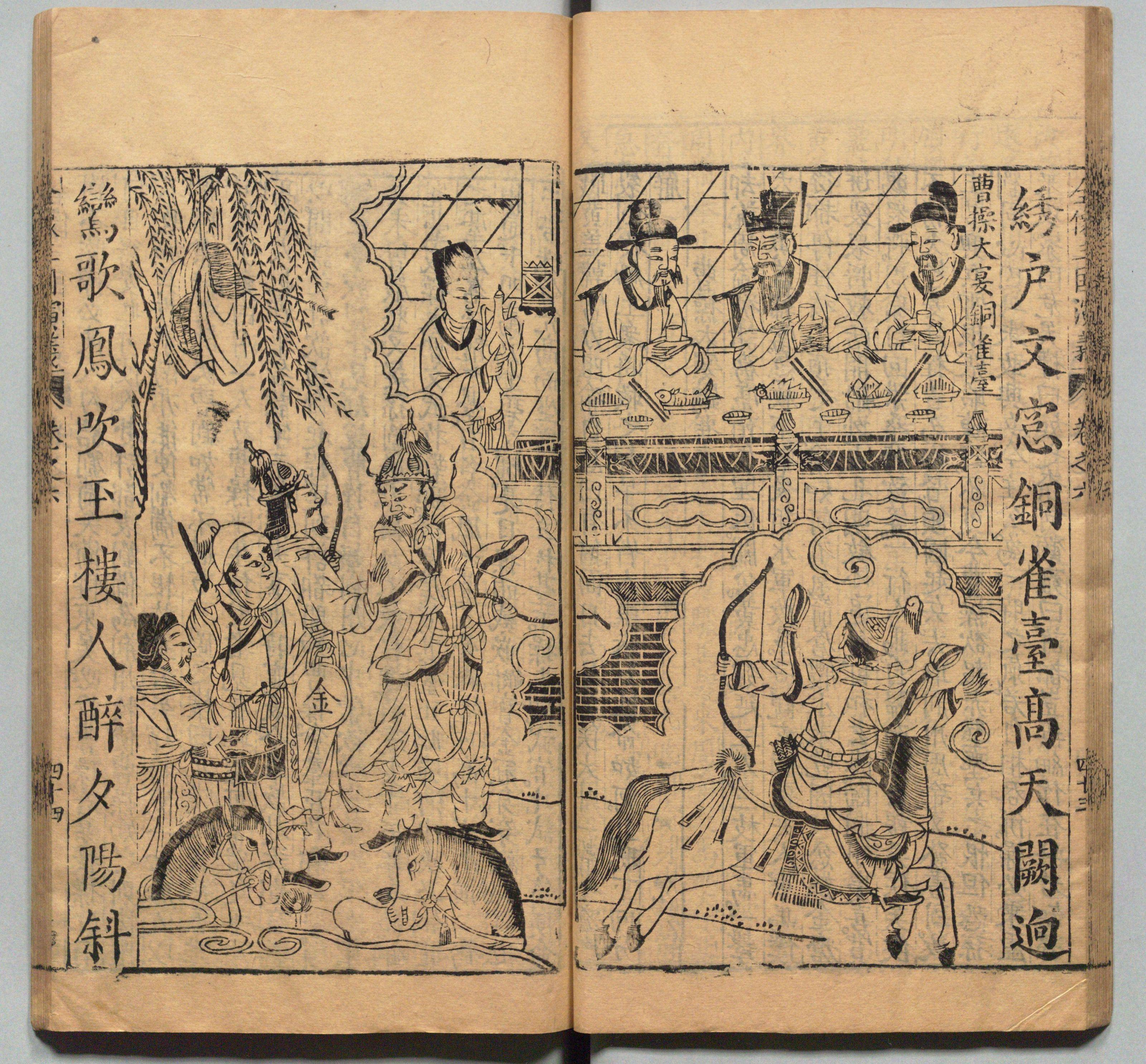 新刊校正古本大字音释三国志通俗演义 明万历十九年书林周曰校刊本